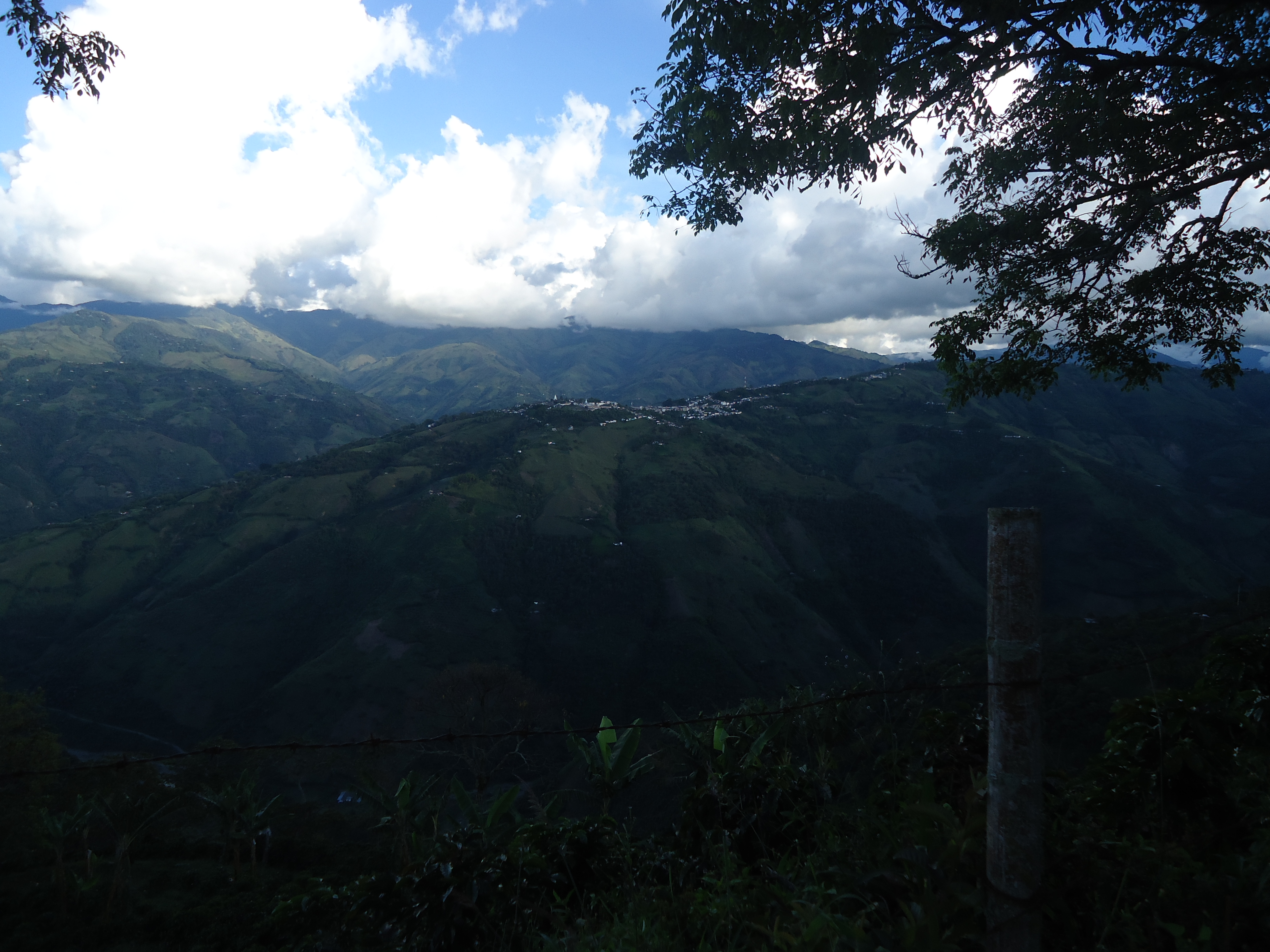 Vista del municipio de salamina, desde vereda cuatro esquinas